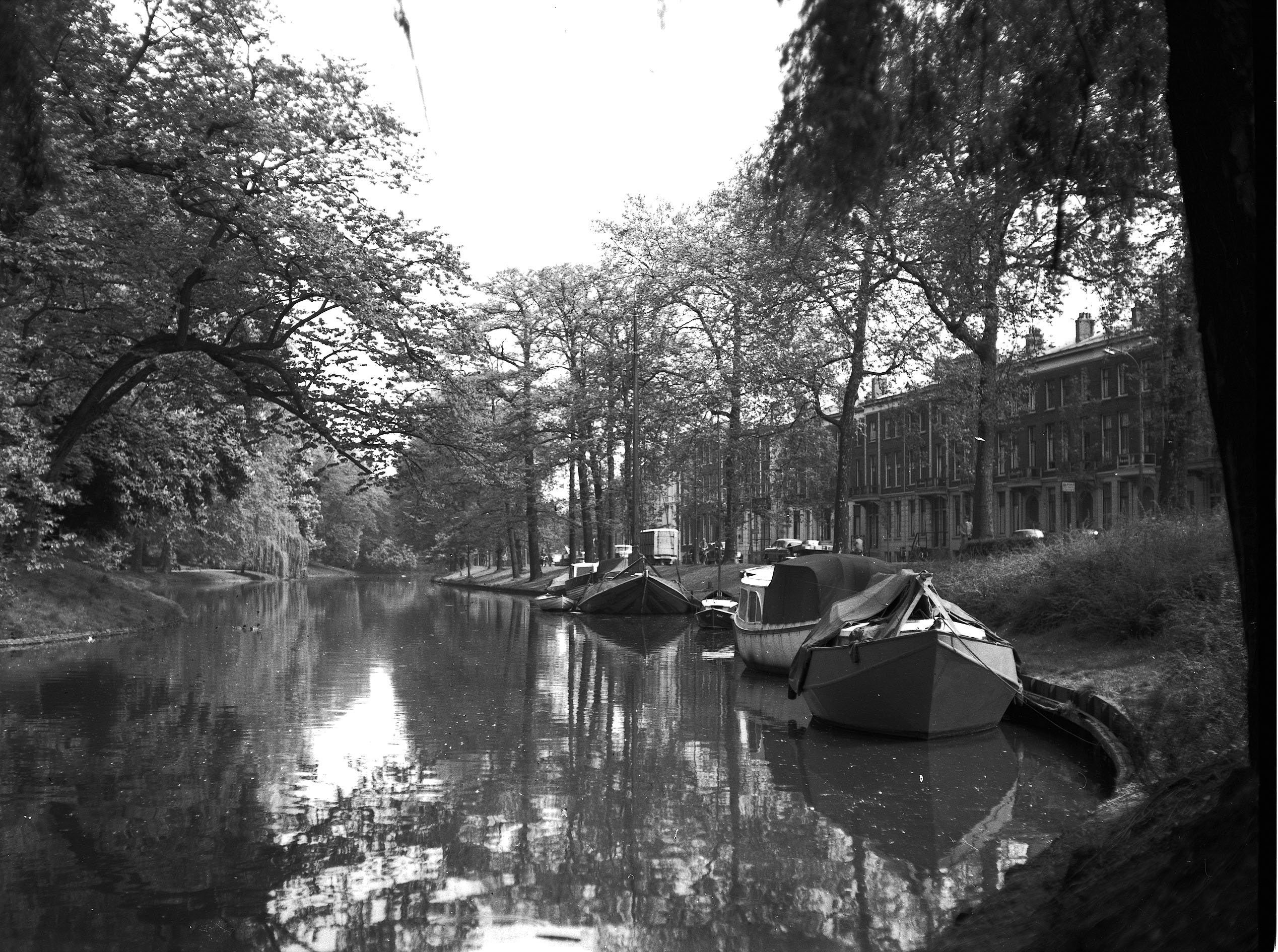 Tolsteegsingel in Utrecht, Nederland